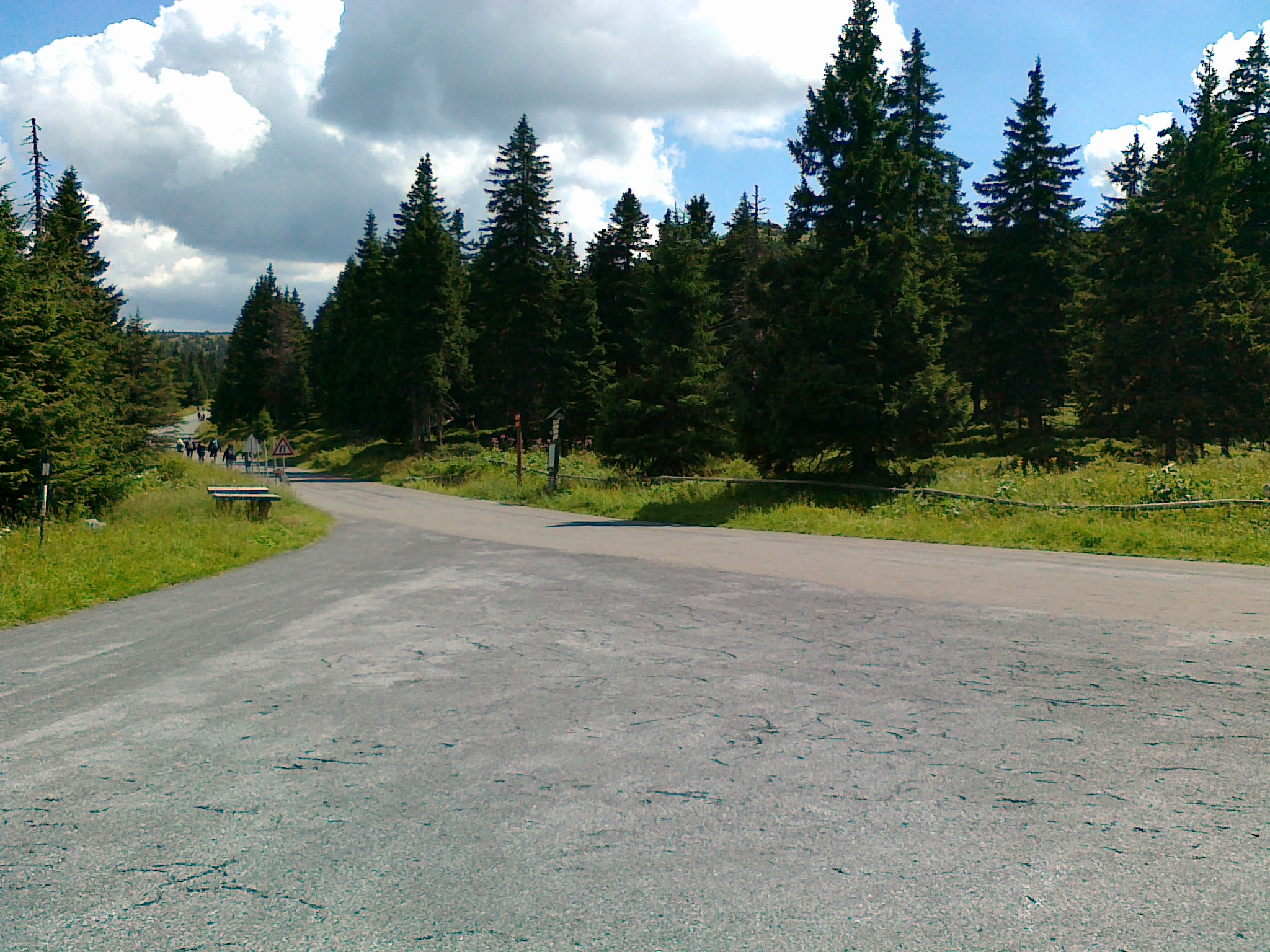 Widok ze skrzyżowania U Barborky na zejście do Hvězdy